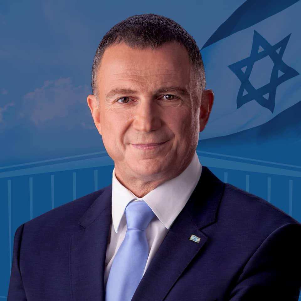 יולי אדלשטיין - תמונת פרופיל